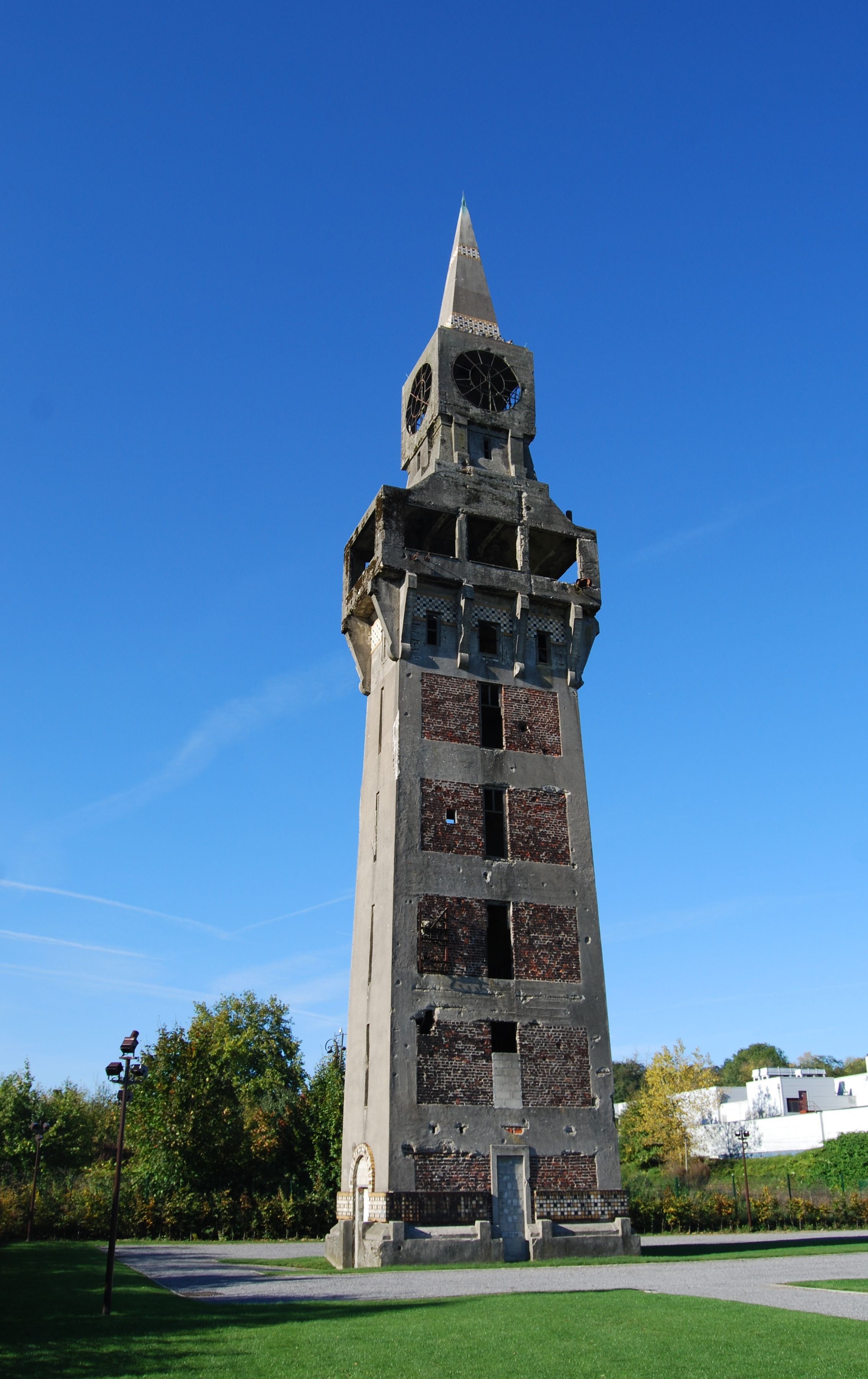 Vue générale